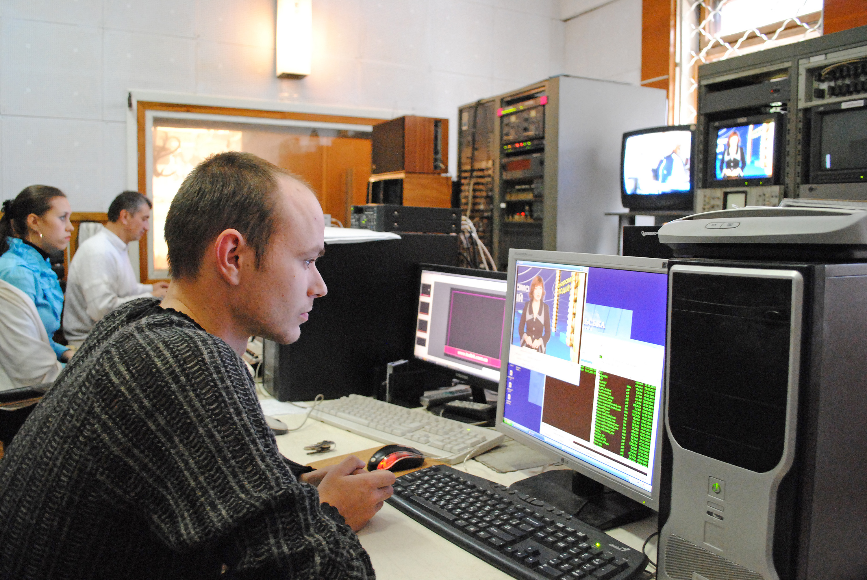 В апаратній «Тернопільської регіональної дирекції» Національної телекомпанії України (Тернопільська обласна державна телерадіокомпанія).